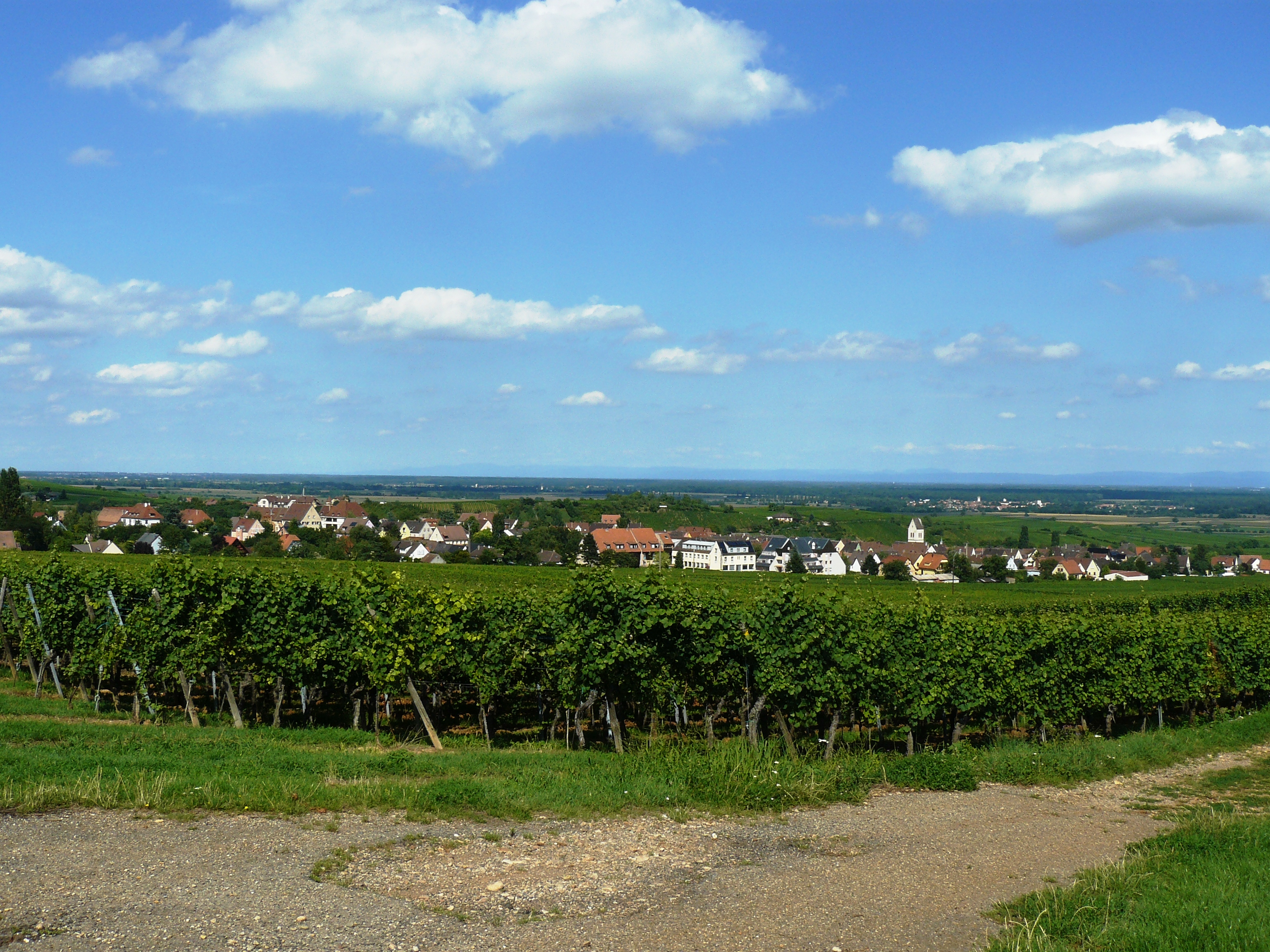 Le village de Mittelwihr vu depuis le vignoble